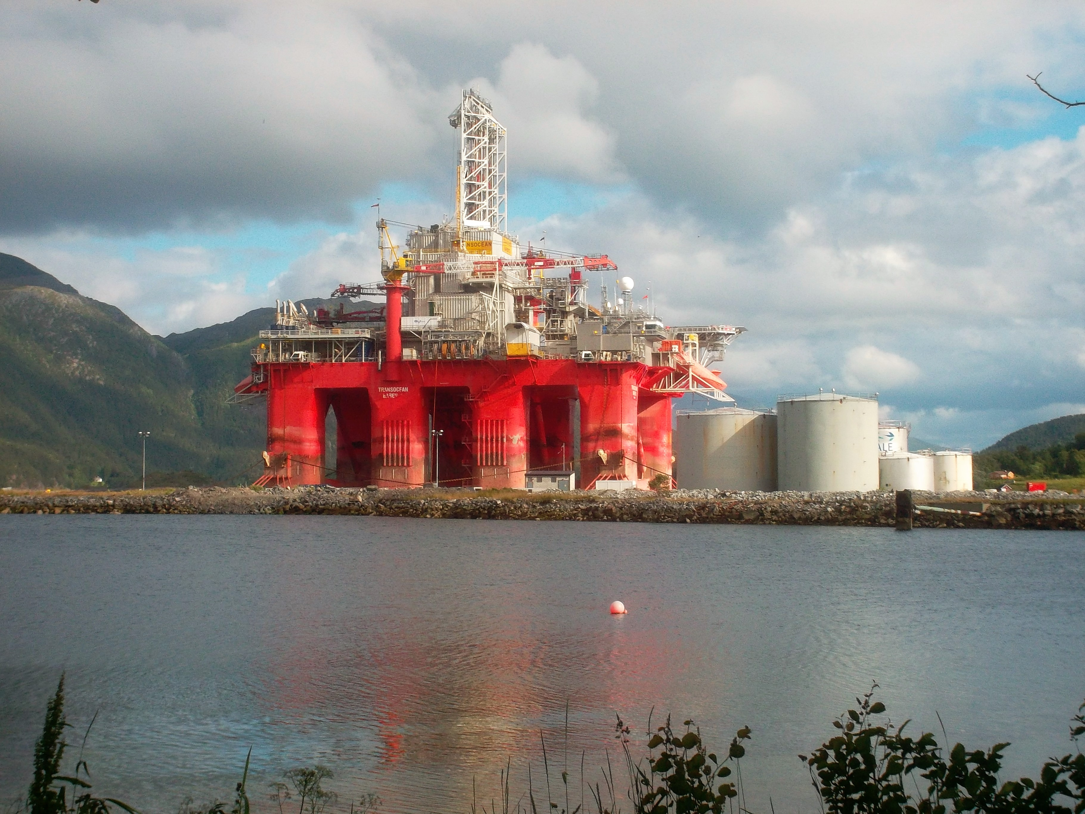 Die Transocean Barents (IMO 8768854) in einem Fjord in Norwegen, aufgenommen im Juli 2016